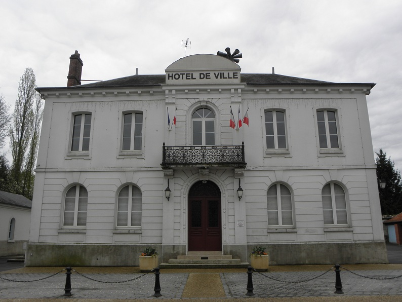 Mairie de Faremoutiers (77).